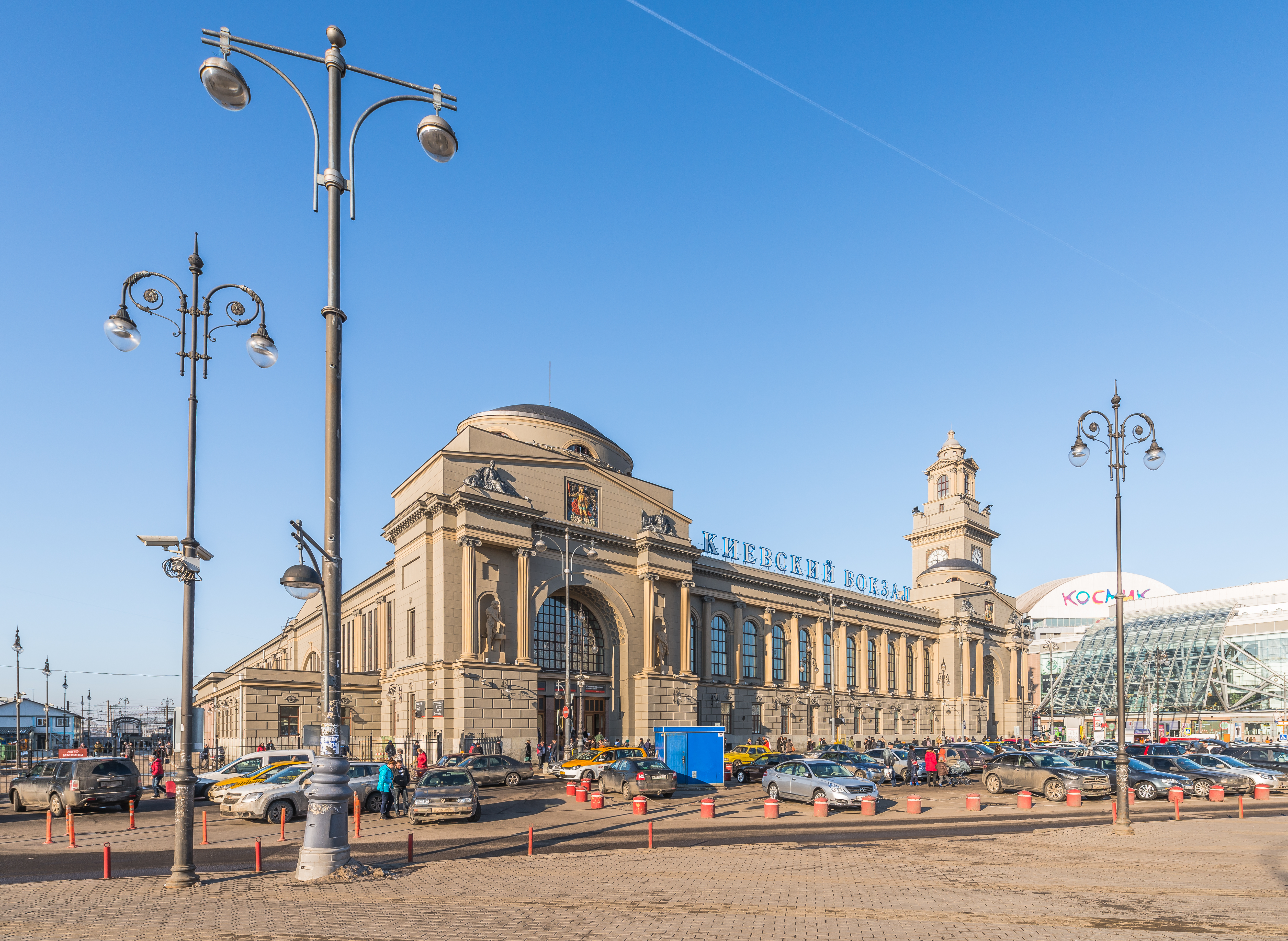 Киевский вокзал: Киевского Вокзала пл., дом 1, Дорогомилово, Западный округ, Москва